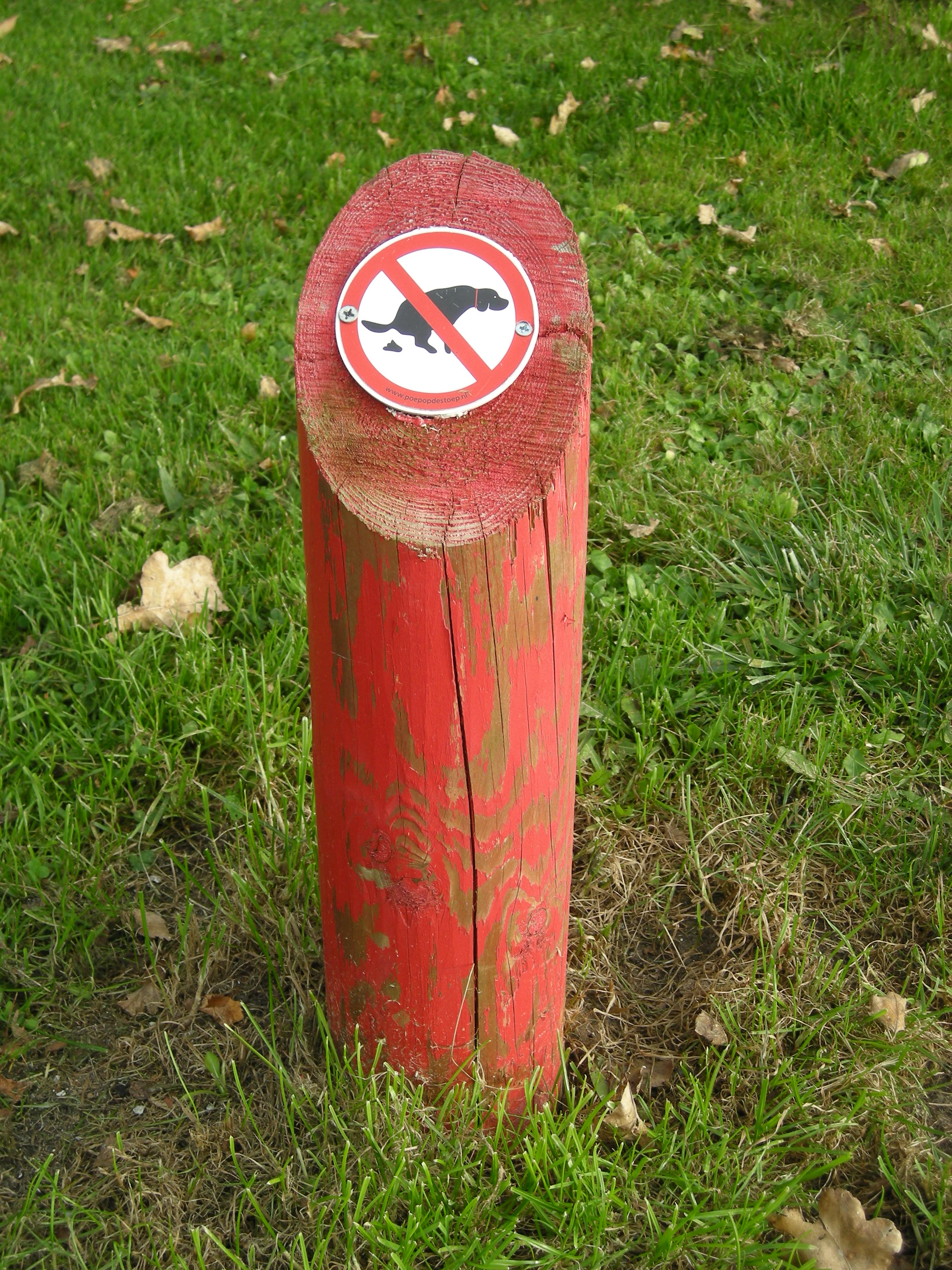 Hondenpoep waarschuwing